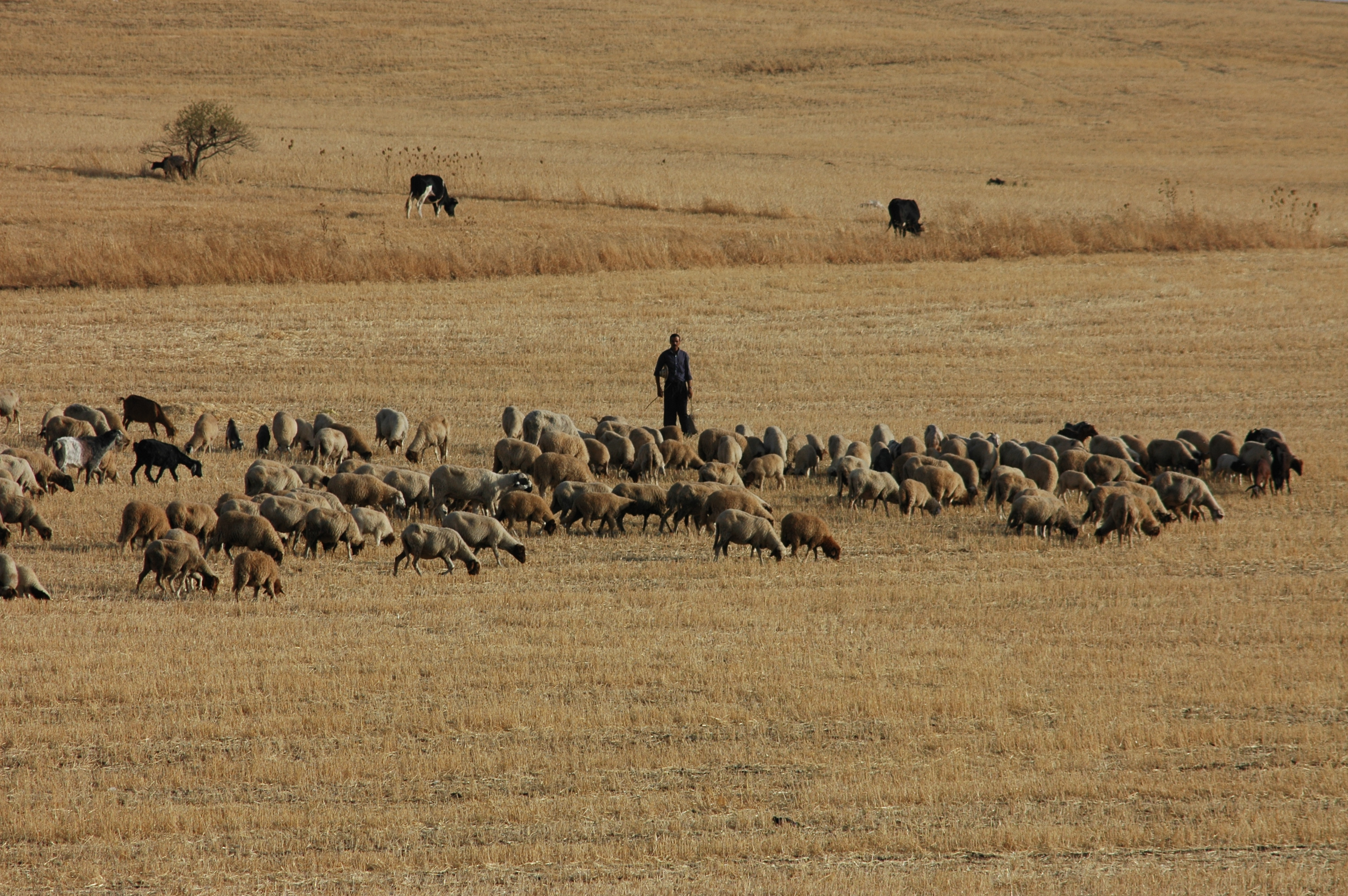 Troupeau ovin sur chaumes